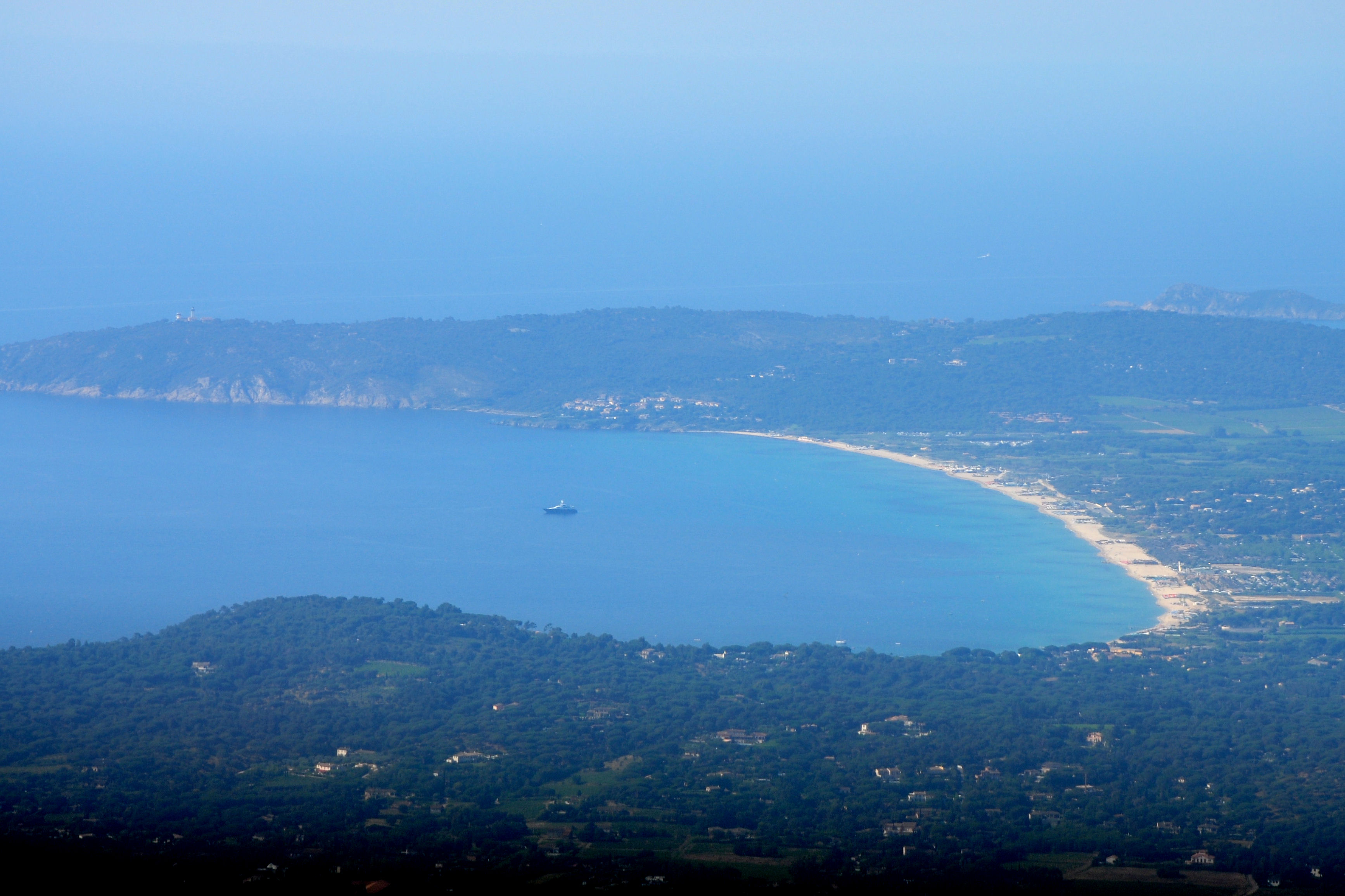 Vue aérienne de la plage de Pampelonne (Ramatuelle)